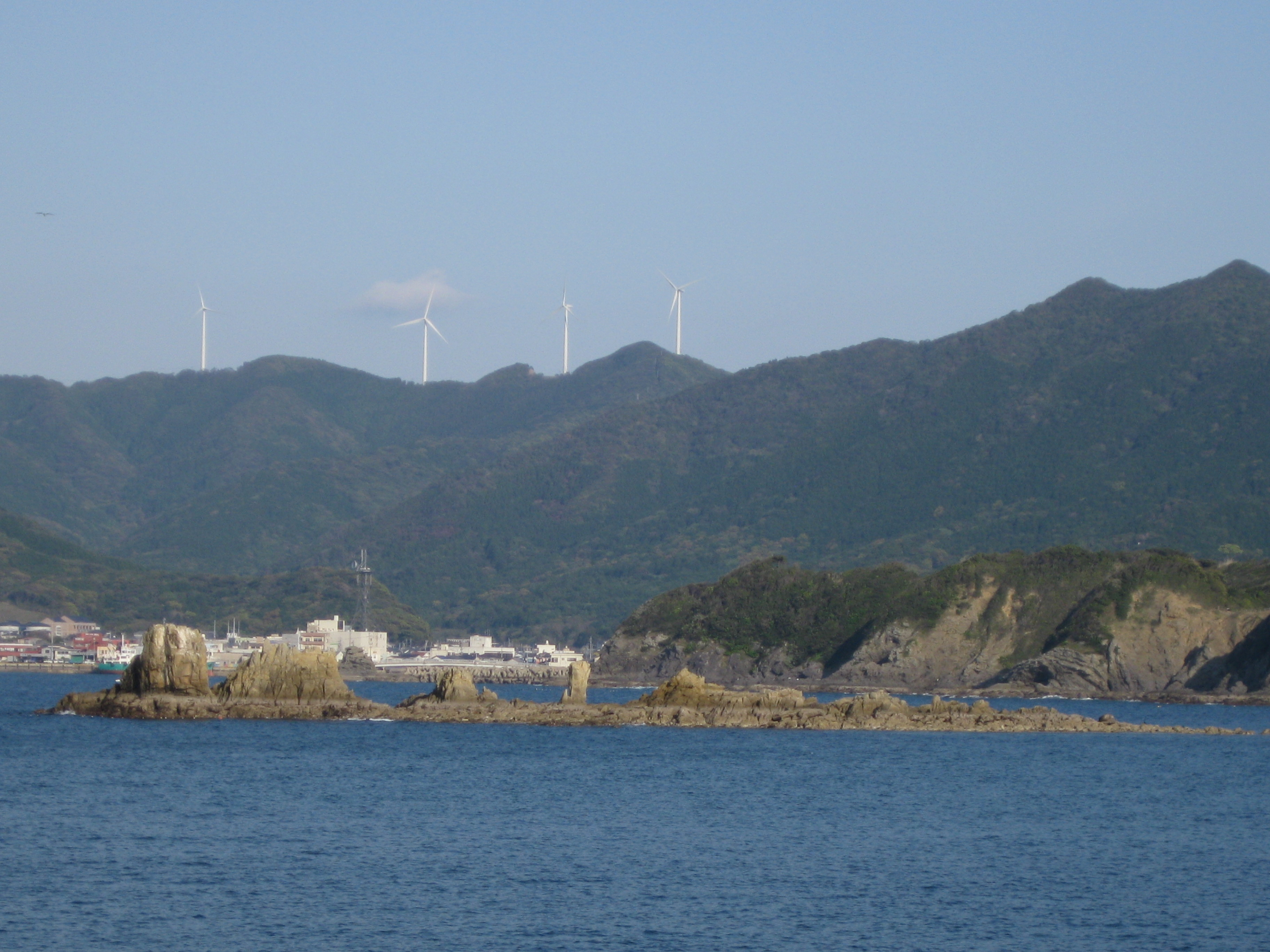 新魚目町 祖父君神社